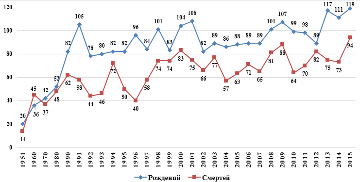 Естесственное движение монегасков